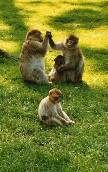 Berberaffen im Affenwald des NaturZoos Rheine